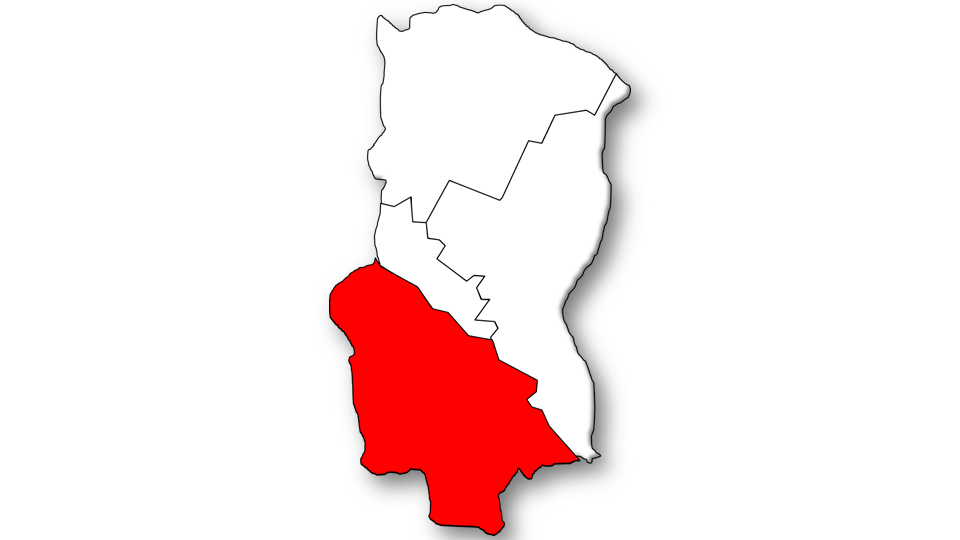 Evolução da População